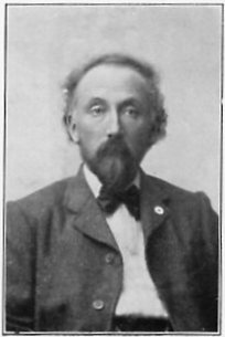 Dreves Uitterdijk, L. K., Hilversum, la "Holanda Pioniro".